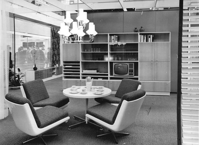 Leipzig, Messe, Musterwohnzimmer ADN-ZB Raphael 8.9.71-se-Leipziger Herbstmesse 1971- Das "Ribnitz-Programm" ist das Ergebnis von Bemühungen der Werktätigen der volkseigenen Möbelindustrie der DDR, die Hauptaufgabe des Fünfjahrplanes durch den Übergang zu universellen Bauteilprogrammen rationell lösen zu helfen. Während die Werktätigen der Holz- und Möbelindustrie Voraussetzungen für die Aufnahme der Produktion und Montage schaffen, haben bereits Formgestalter und Innenarchitekten Entwürfe kompletter Einrichtungsensembles erarbeitet, die sie auf der Herbstmesse vorstellen . Eines zeigt unser Foto. Die aus einheimischen Rohstoffen herstellbaren standardisierten Bauelemente ermöglichen eine abwechslungsreiche individuelle und den Wohnraumverhältnissen angepaßte Ausstattung (siehe ADN-Meldung)